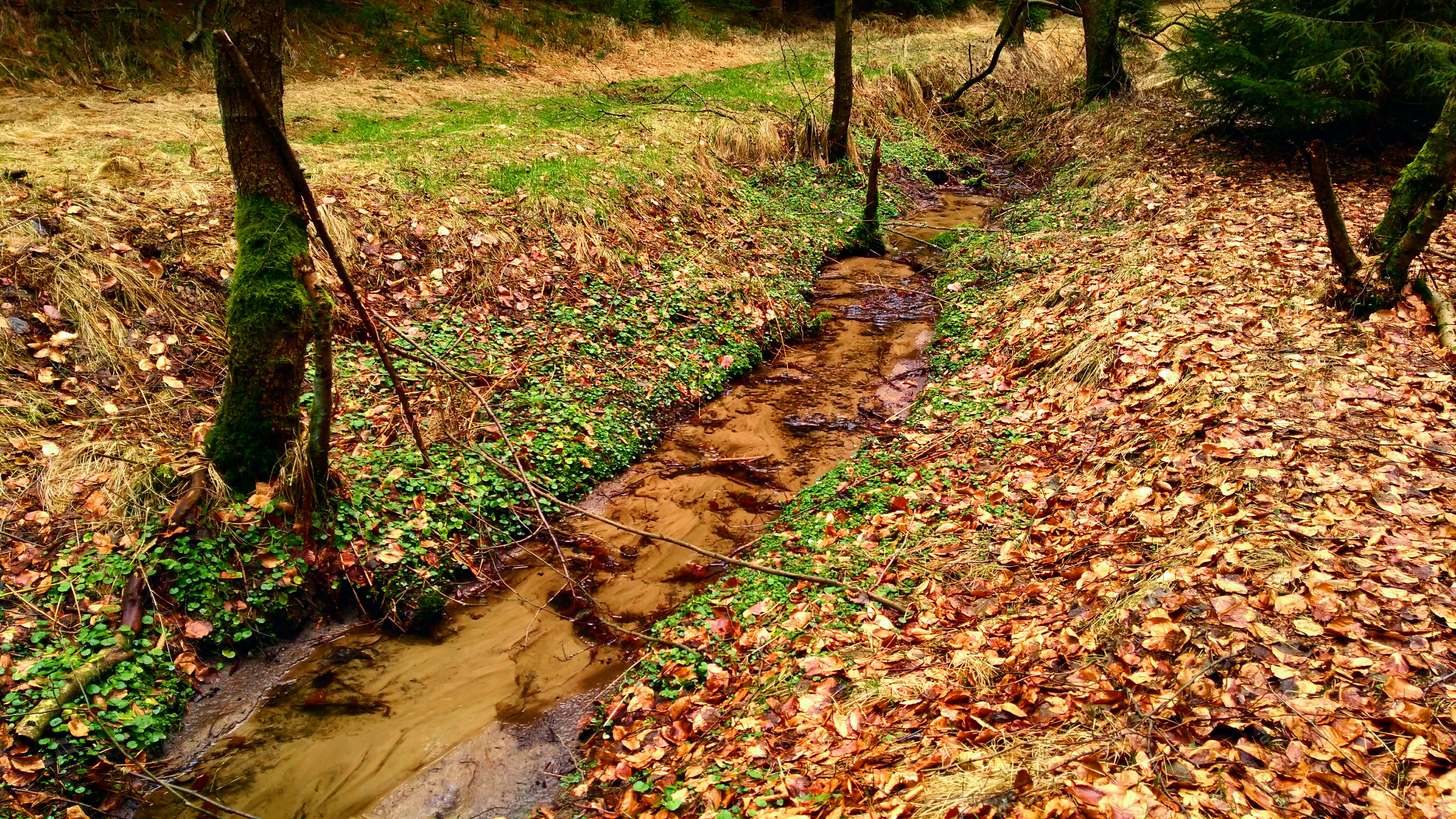 Potok.